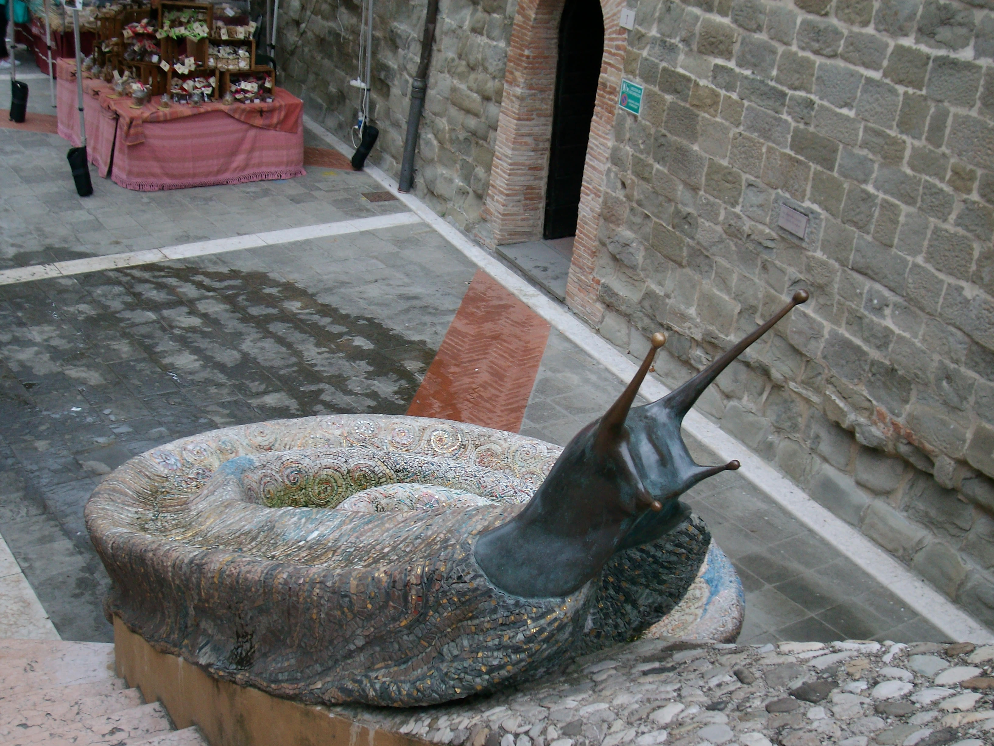 Fontana della lumaca di Sant'Agata Feltria Licensing